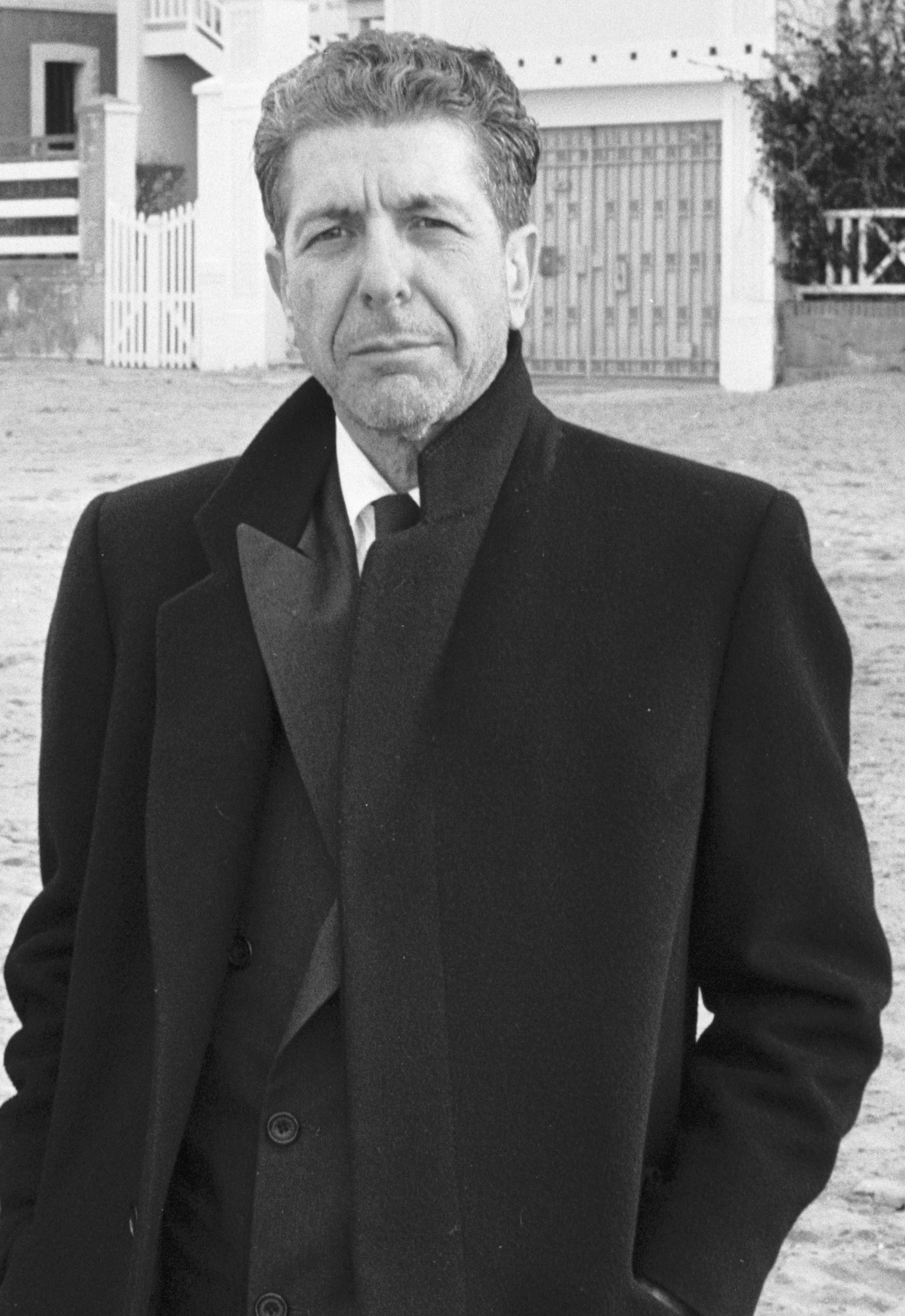 Le chanteur canadien Leonard Cohen à Trouville-sur-Mer (Normandie, France) le 26 janvier 1988.